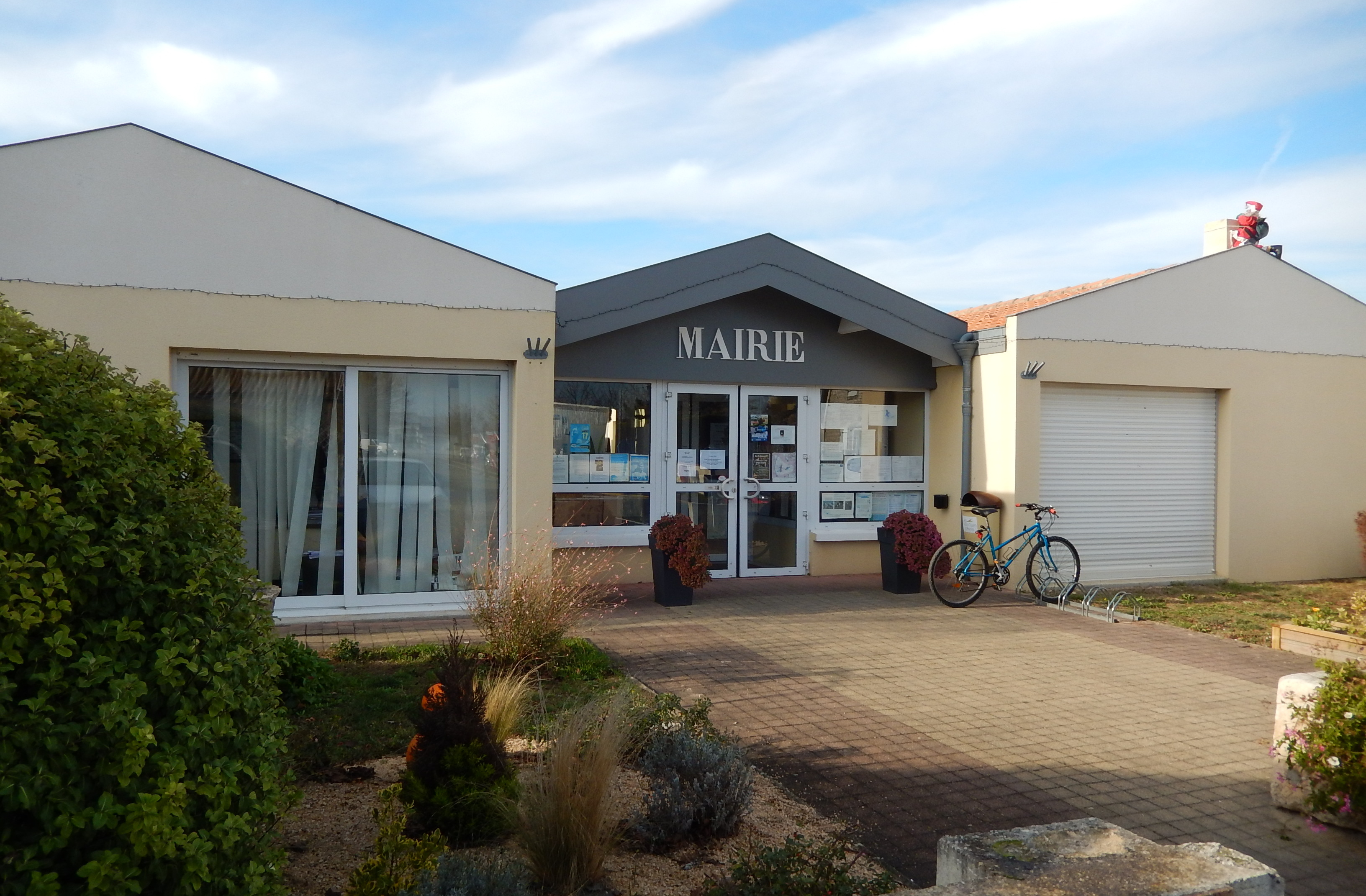 Saint-Ouen-d'Aunis, Charente-Maritime, France. Le bâtiment de la mairie, dans la rue Marie-Louise Cardin.